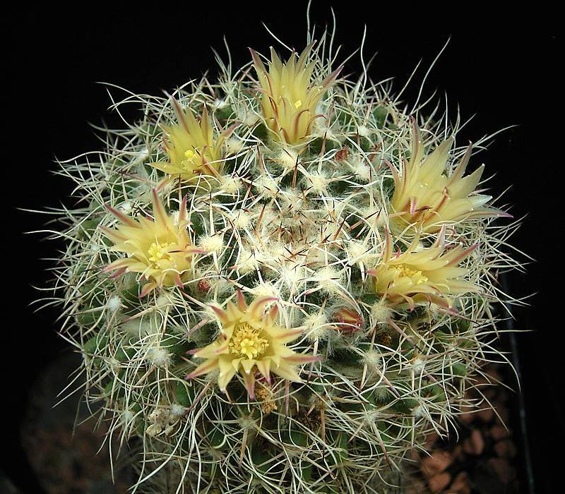 Mammillaria karwinskiana ssp. nejapensis